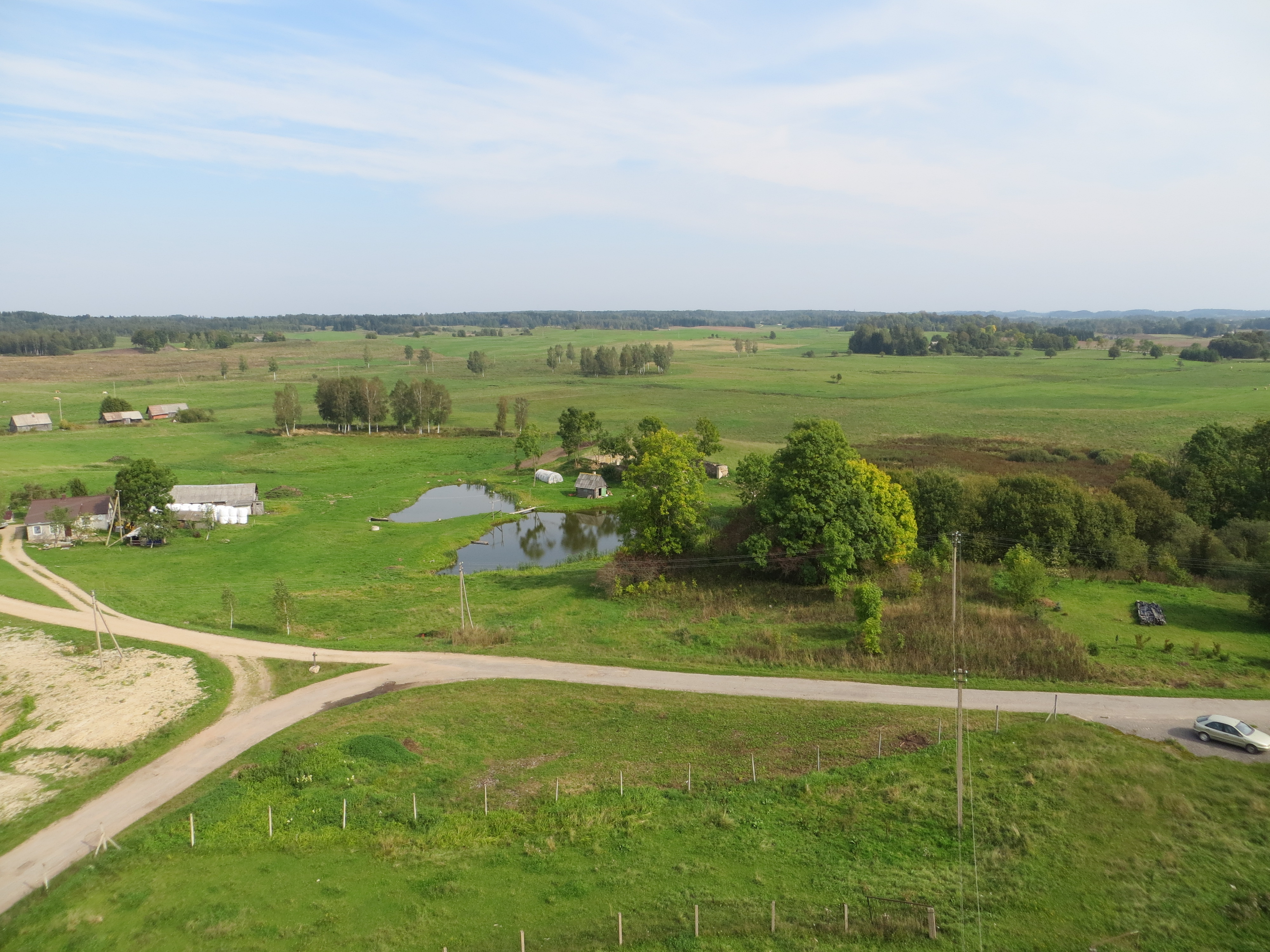 Giedraičių sen., Lithuania